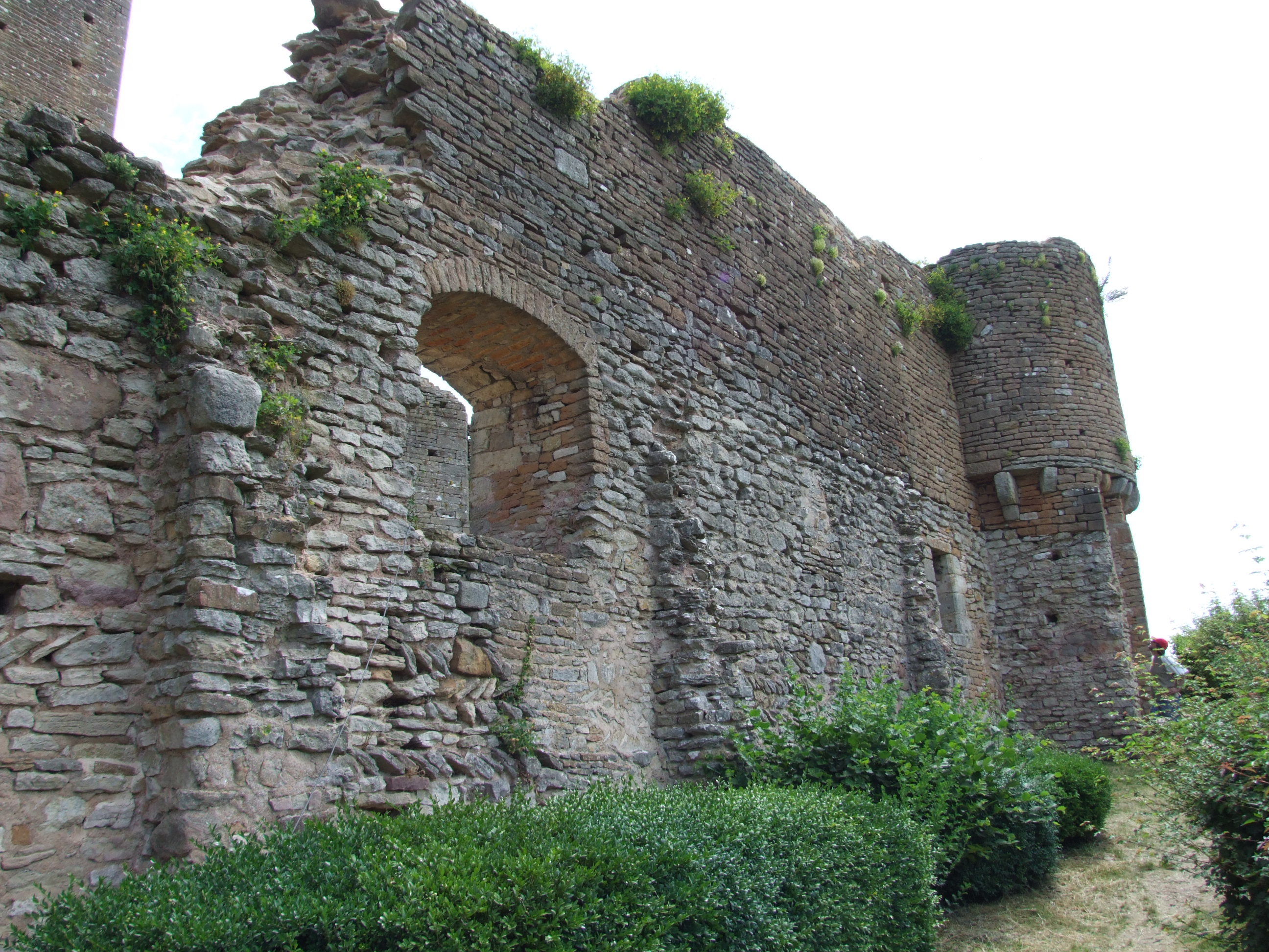 Brancion, Saône-et-Loire, Bourgogne, France